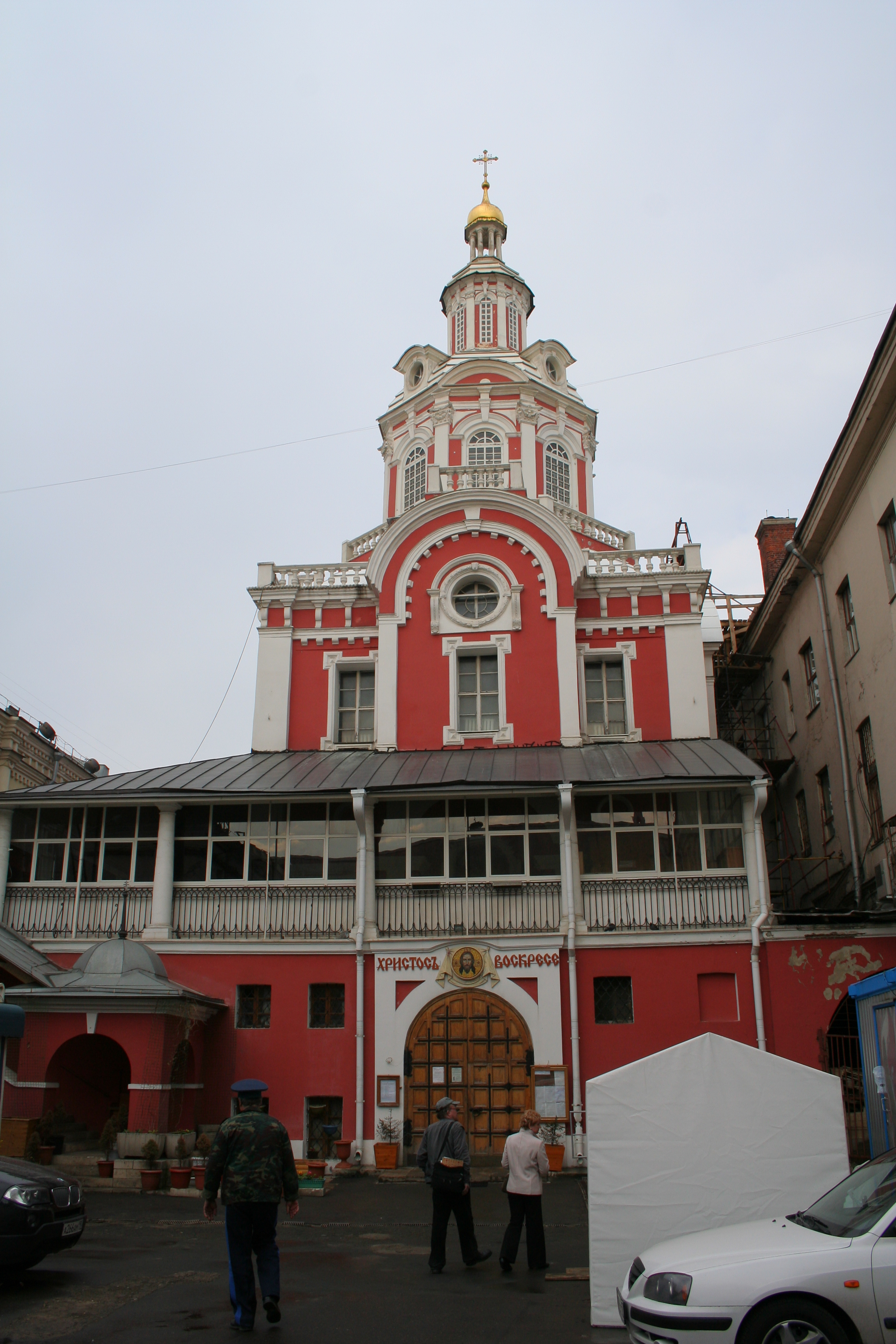 Kirche des Nicht von Menschenhand geschaffenen Erlöserbildnisses an der Nikolskaja-Straße in Moskau